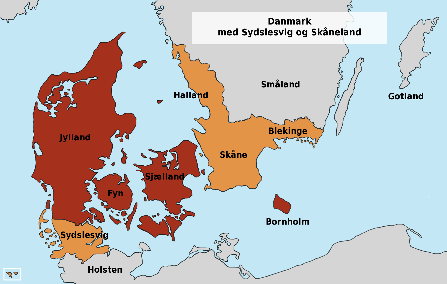 Nutidens Danmark med Sydslesvig, Skåne, Halland og Blekinge